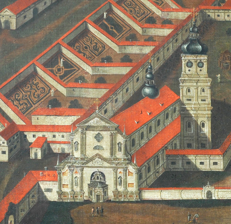 Беларуская (тарашкевіца): Бяроза Картуская (Biaroza Kartuskaja), кляштарны комплекс картузаў